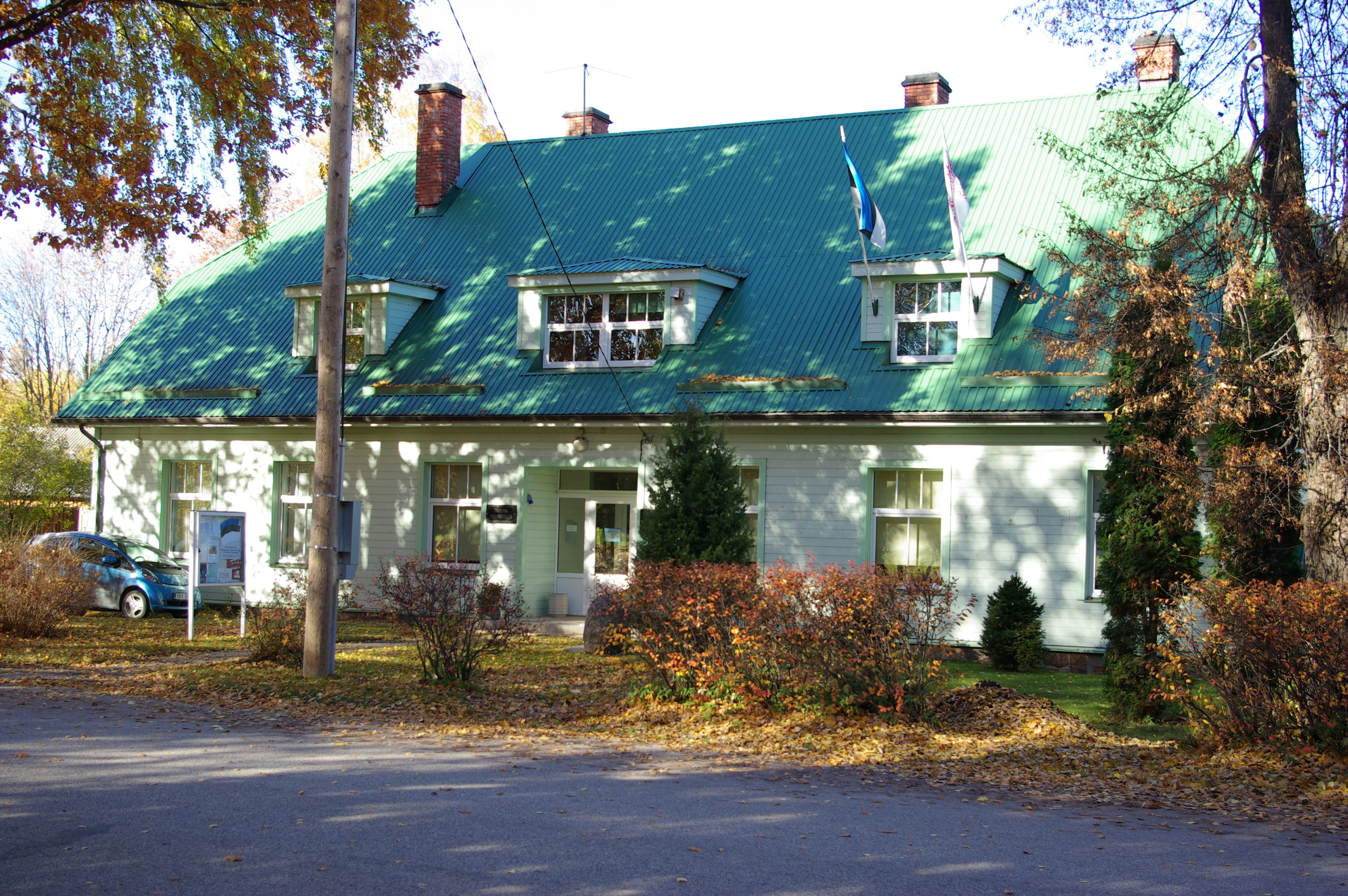 Meremäe vallamaja